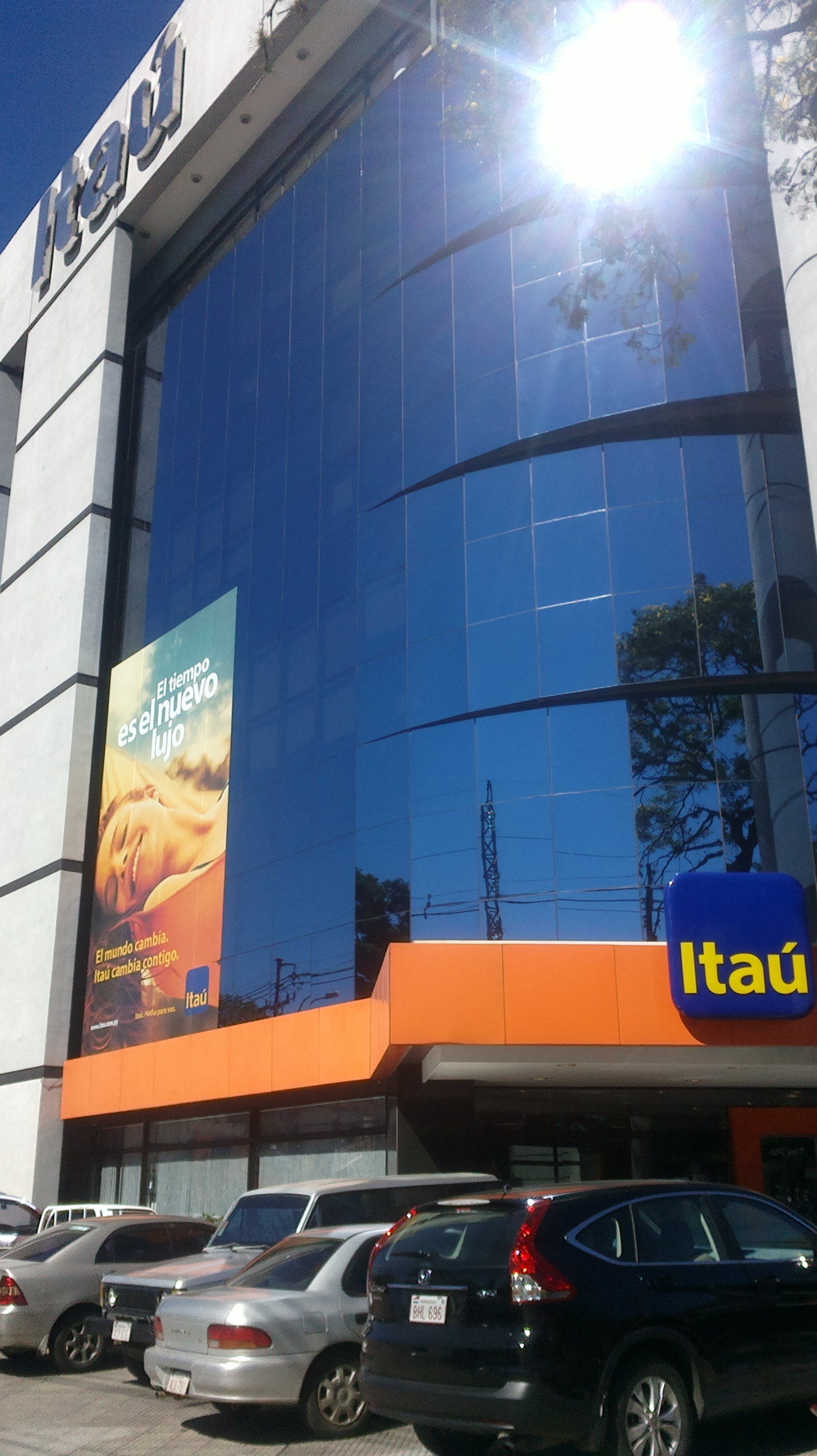 Banco Itau en Asunción, Paraguay